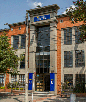 Edifcio sede unitec